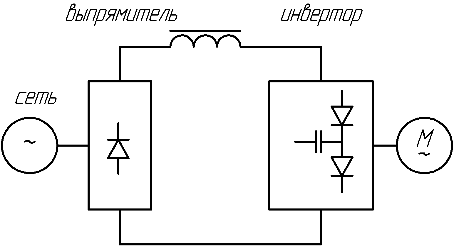 преобразователь частоты, представляющий собой источник тока